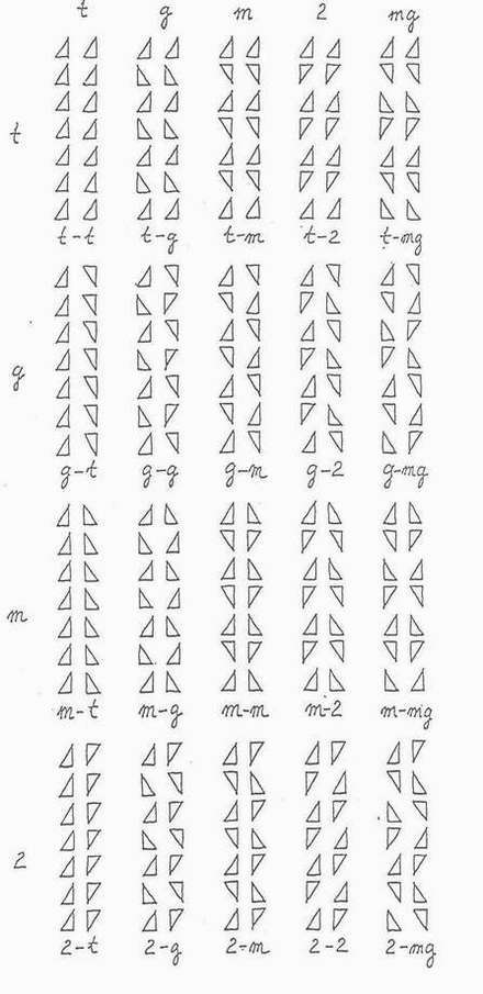 A frízekből síkbeli szomszédsági szimmetriaműveletekkel, kettőzéssel előállított kettősfrizek táblázata